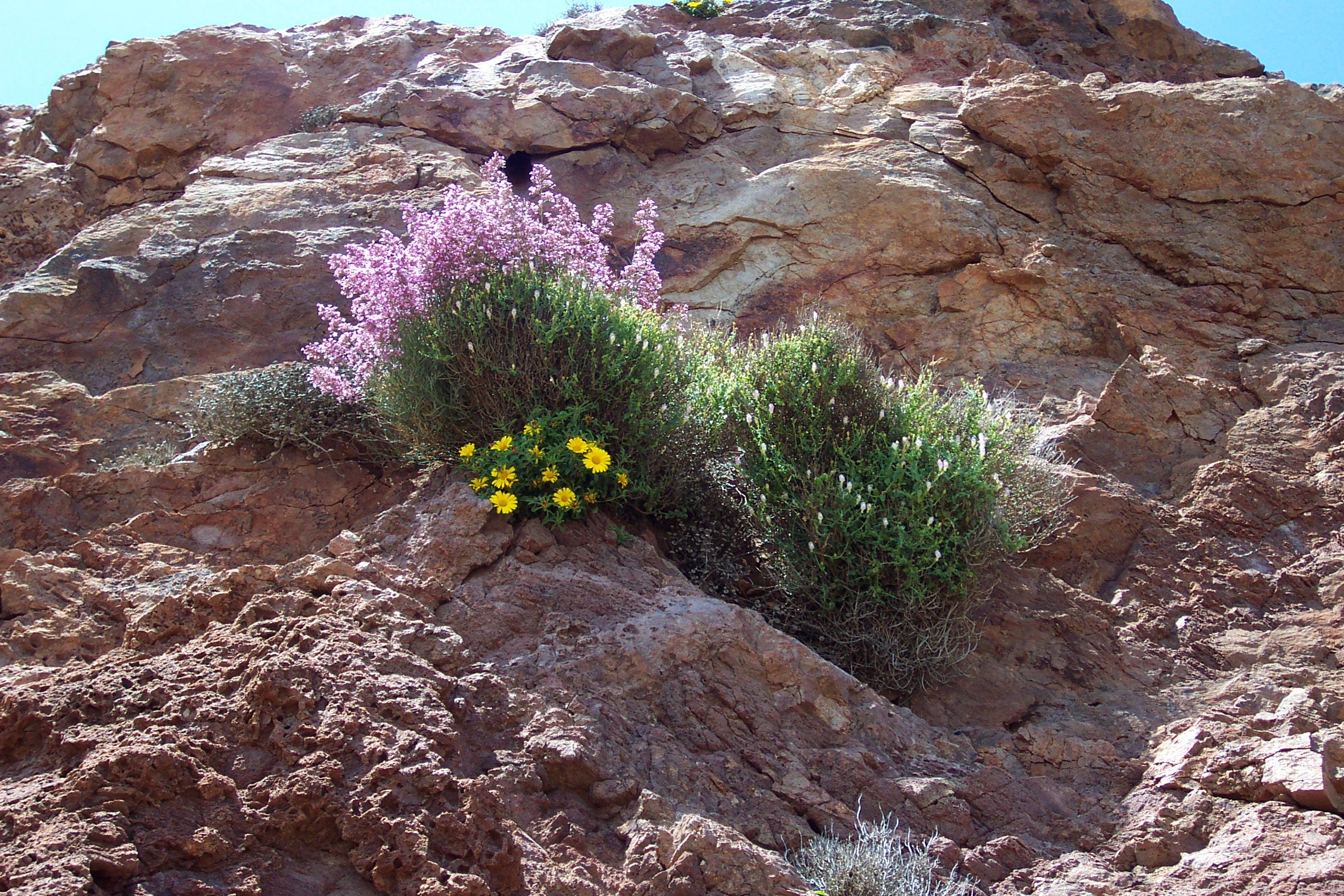 Fotografía de un ejemplar de Limonium insigne, de Antirrhinum charidemi y de Asteriscus maritimus (de arriba abajo), flora característica de la zona, sobre la pared rocosa, tomada en la Sierra del Cabo de Gata, provincia de Almería, España.